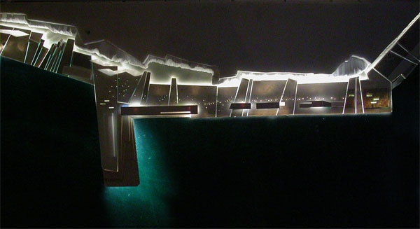 Akershusstranda slik Gullik Gulliksen AS har tenkt seg.